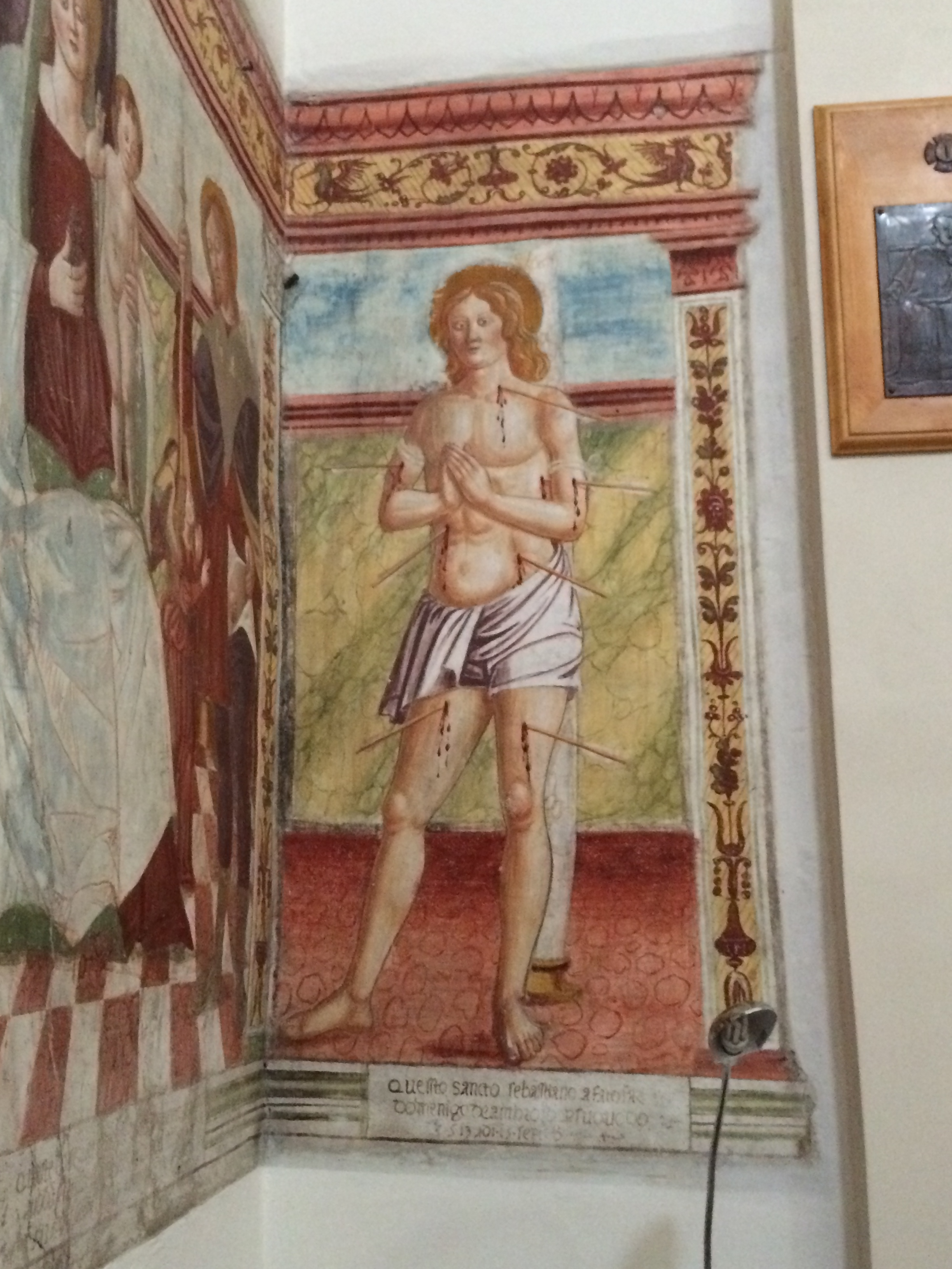 Chiesa di San Leonardo (Provesano)